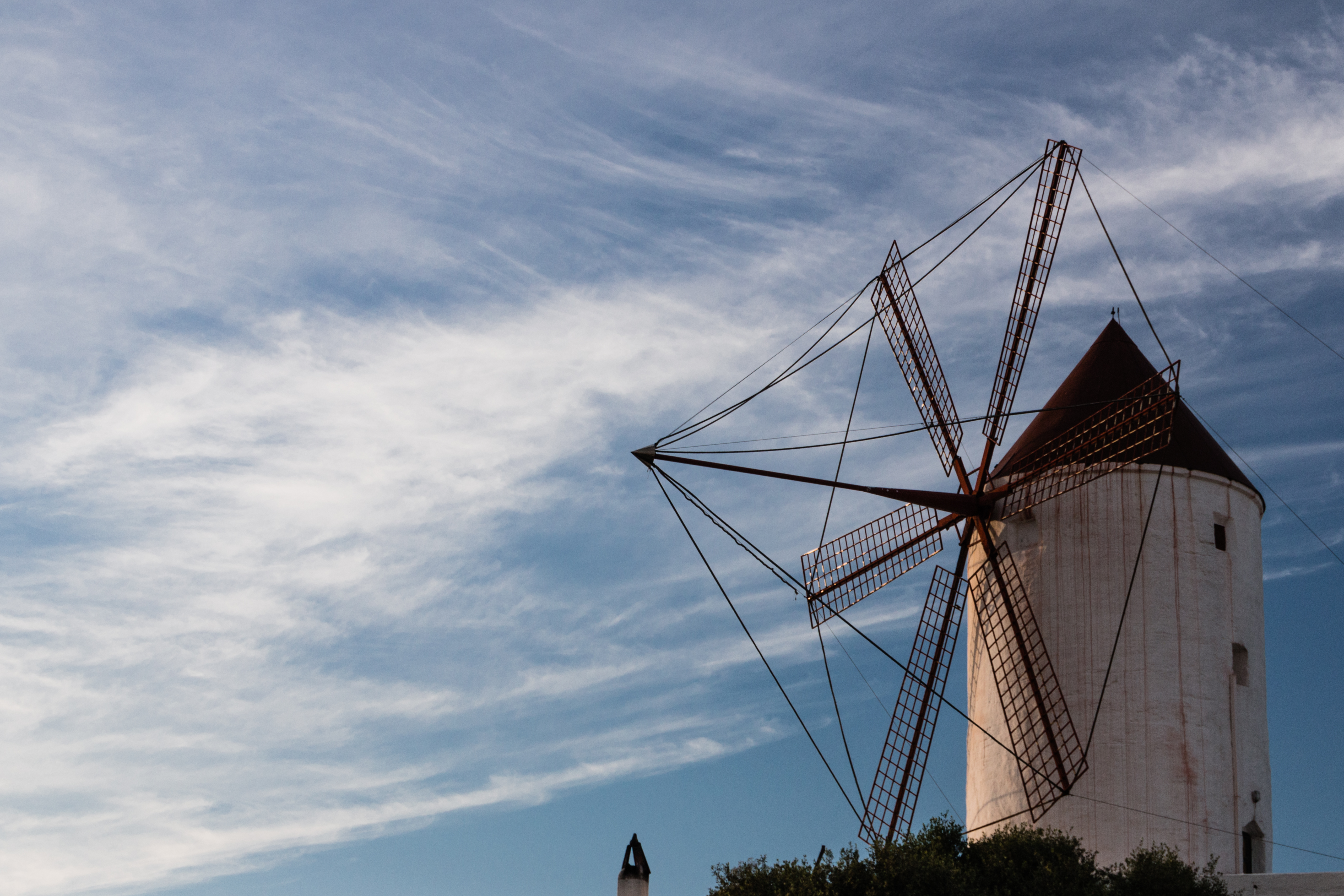 Menorca_2014-092.jpg